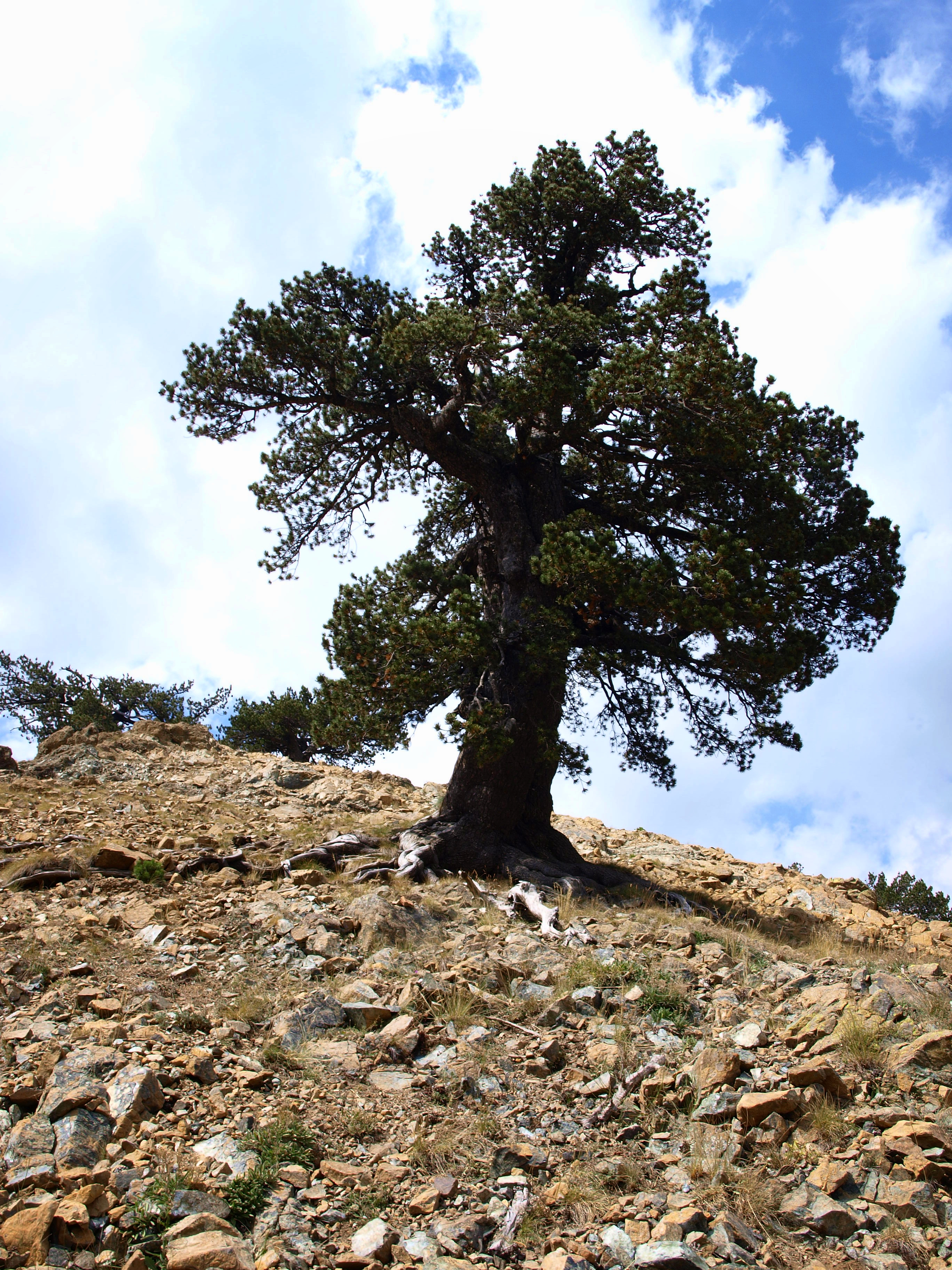 Ρόμπολο/Λευκόδερμη Πέυκη (Pinus heldreichii) στην Βάλλια Κάλντα This is a photography of Natura 2000 protected area with ID GR1310002